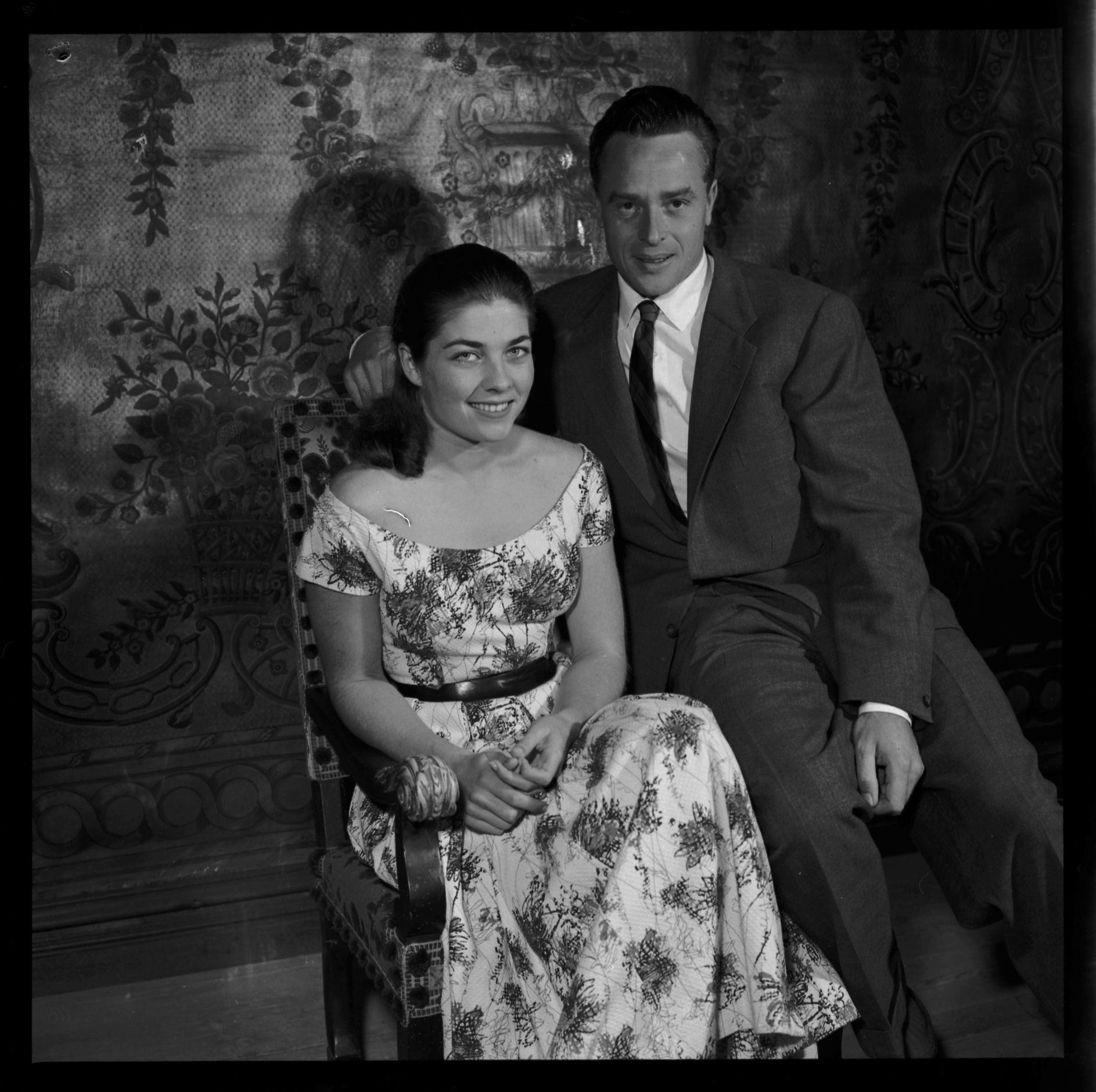 Lot-et-Garonne. Octobre 1956. Vue de Hélène de France et du comte de Limbourg Stirum posant sur un canapé.